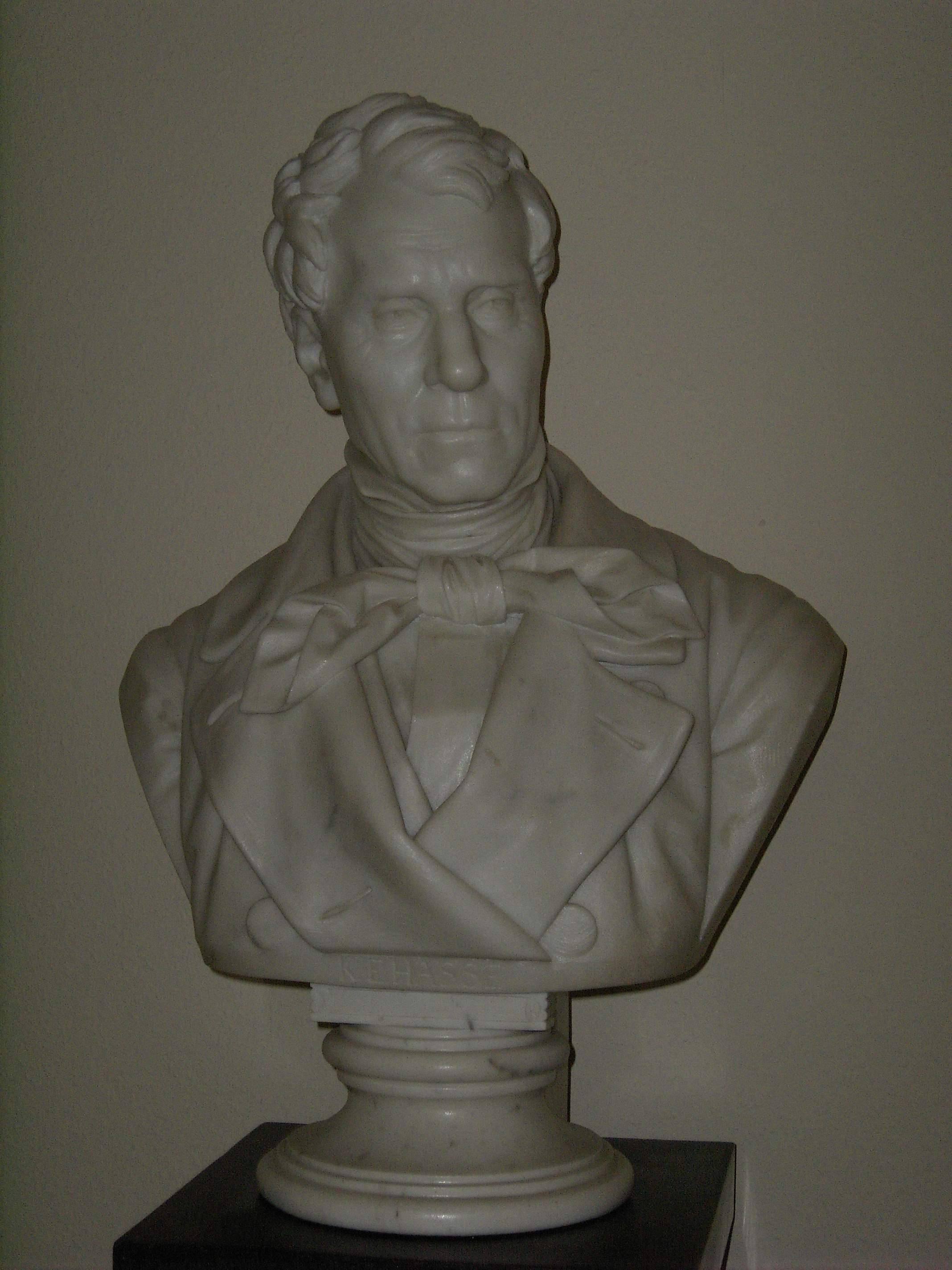 Büste des Pathologen Karl Ewald Hasse (1810-1902). Die Büste wurde 1878 von Carl Ferdinand Hartzer (1838-1906) geschaffen.